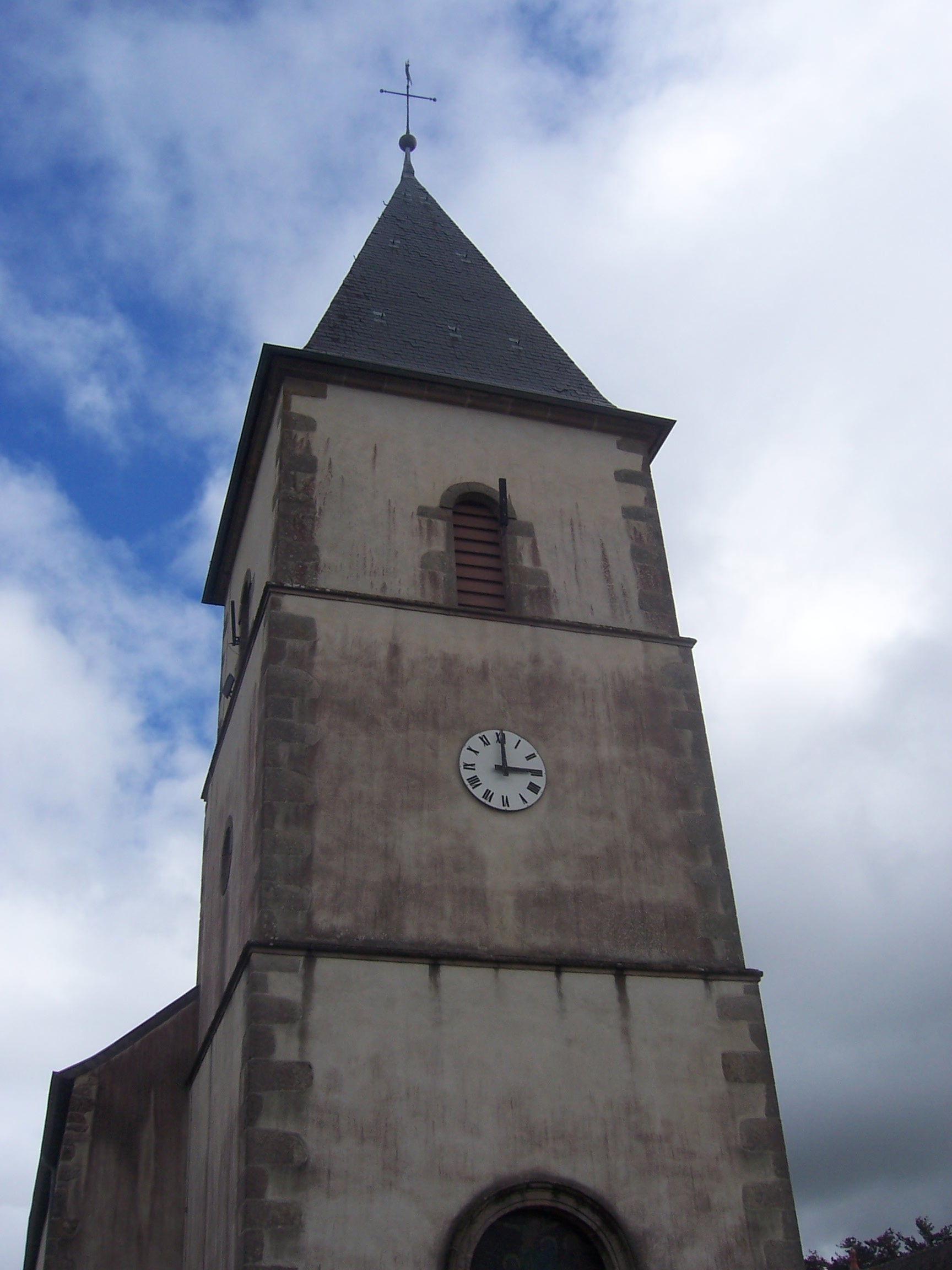 Eglise de Saint-Didier-sur-Arroux